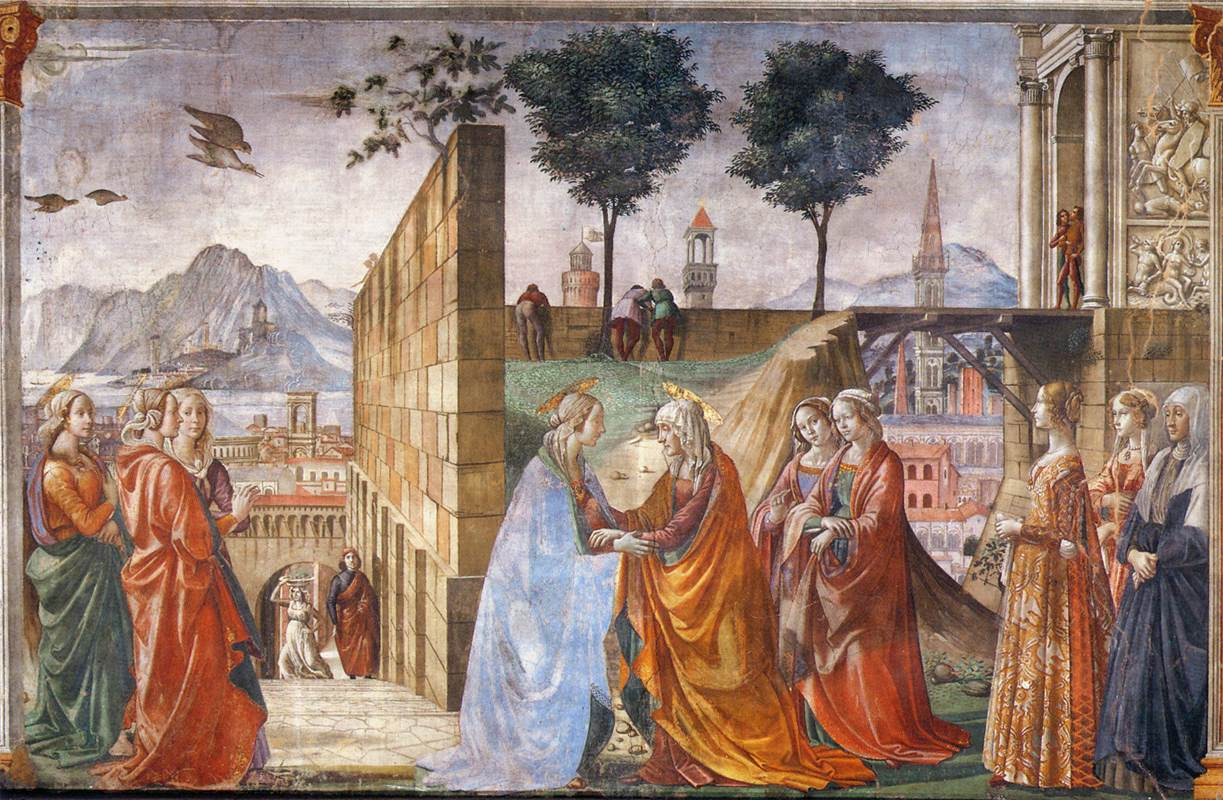 GHIRLANDAIO, Domenico Visitation Fresco Cappella Tornabuoni, Santa Maria Novella, Florence